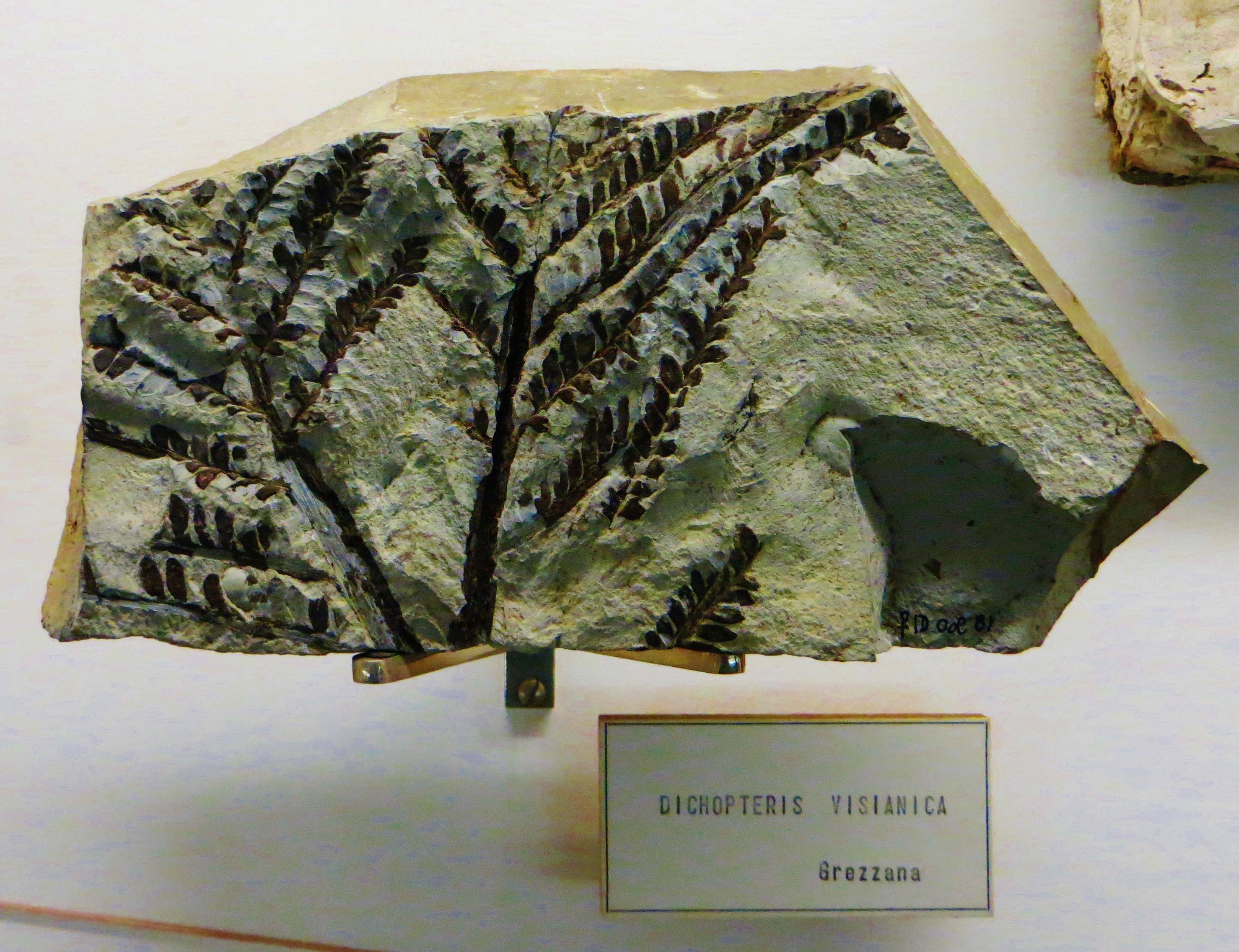 Fossil of Dichopteris, an extinct plant- Took the photo at Museo di Storia Naturale di Verona